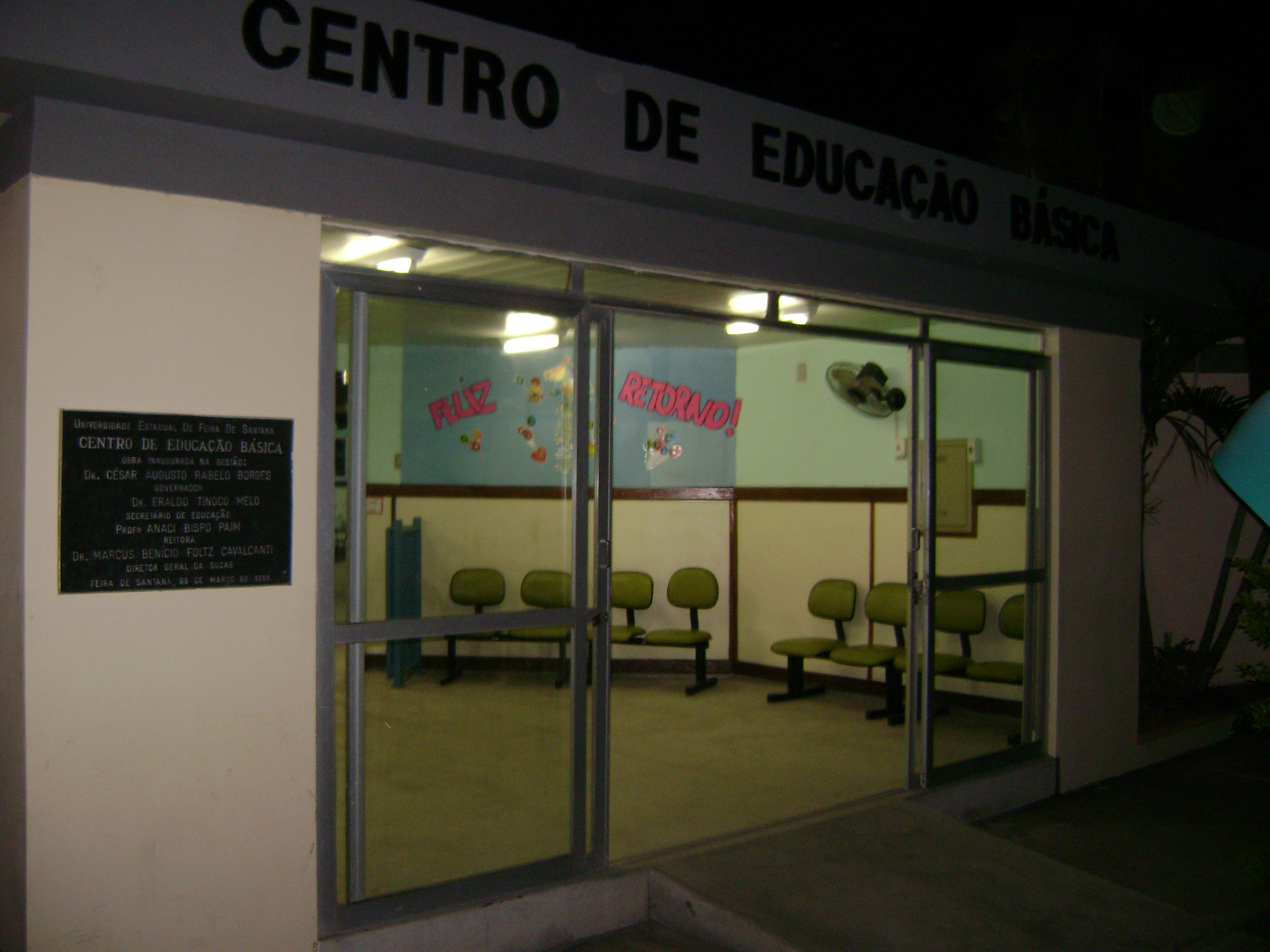 Centro de Educação Básica da UEFS.